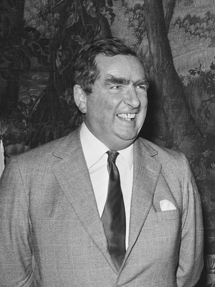 Goudconferentie ministers van Financien van de EEG-landen Zeist; v.l.n.r. Denis Healey , Helmut Schmidt en Duisenberg